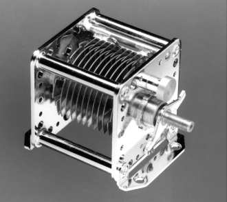 Einfach-Drehkondensator